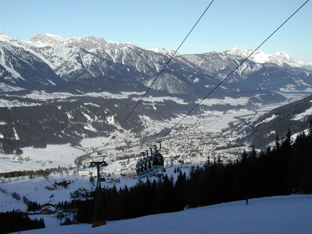 Schigebiet Schladming, Hochwurzen. Im Hintergrund das östliche Dachsteingebirge